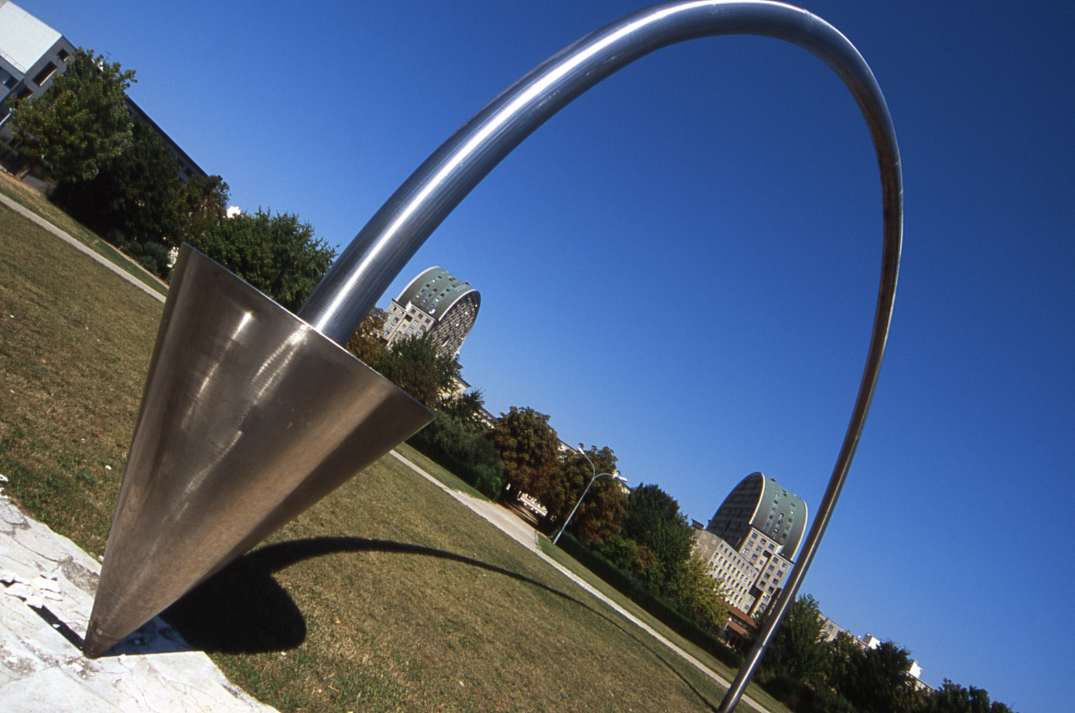 Own work. Une vue du quartier du Pavé Neuf à Noisy-le-Grand, construit par l'architecte Ricardo Bofill. Cliché : moi. Inversible type RHP III 135 mm. Catégorie:Noisy-le-Grand